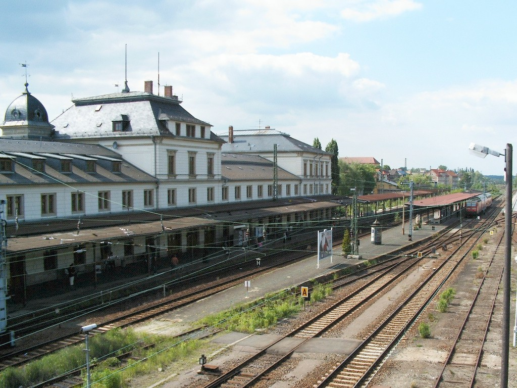 Altenburg Hauptbahnhof